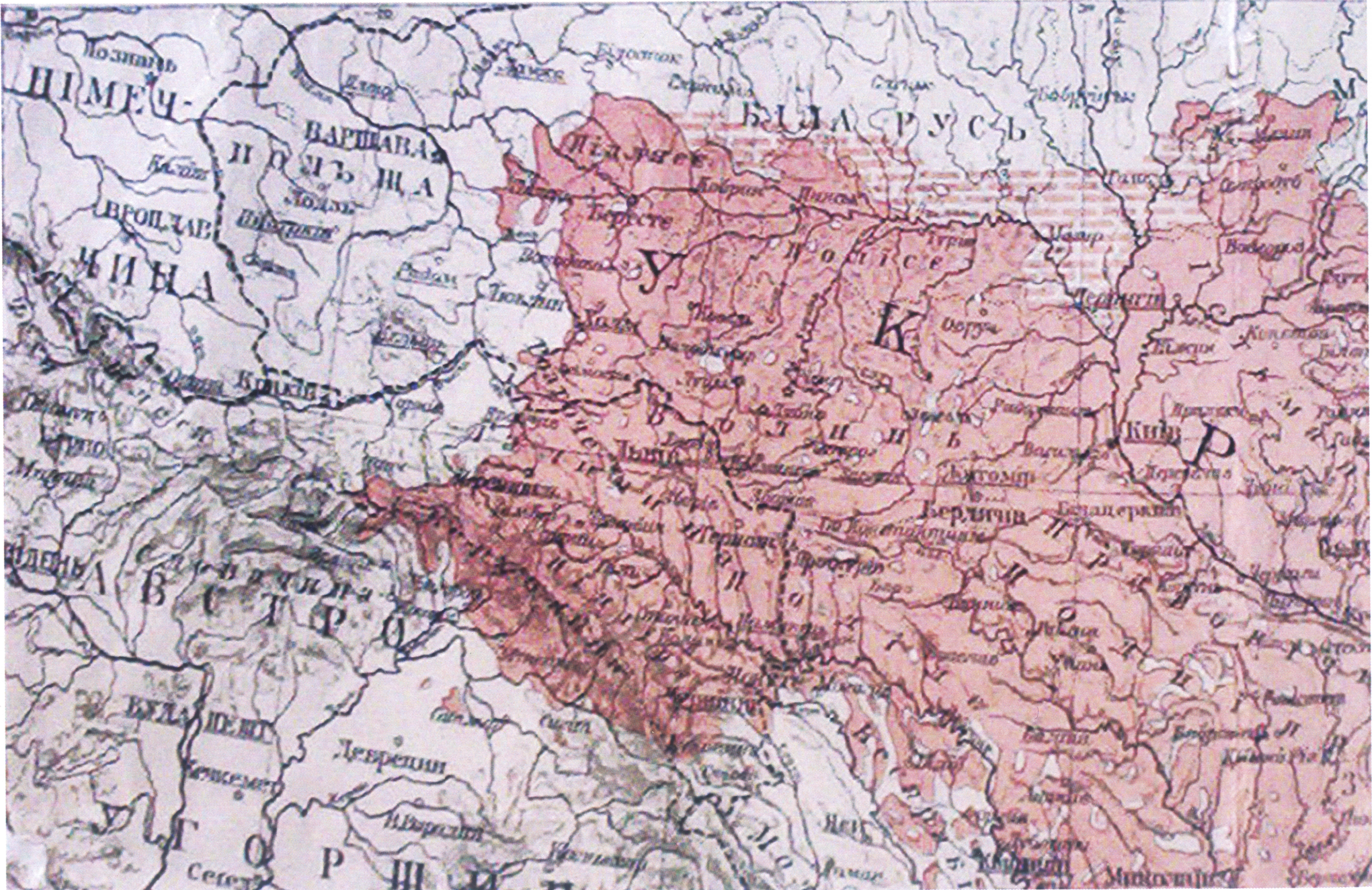 Opracowana w 1918 roku ukraińska mapa, przedstawiająca z ukraińskiego punktu widzenia zachodnią część ziem etnicznie ukraińskich